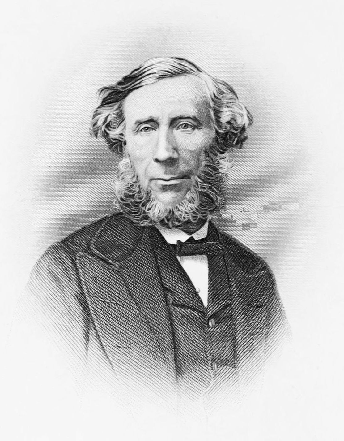 John Tyndall